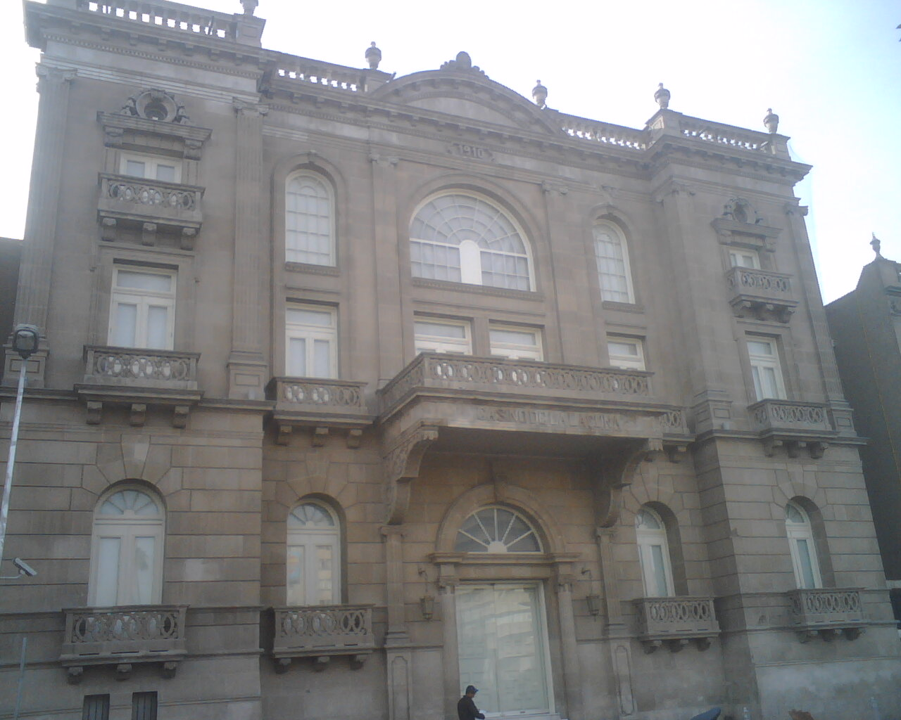 Construido en 1910, es uno de los emblemas del centro histórico de Torreón